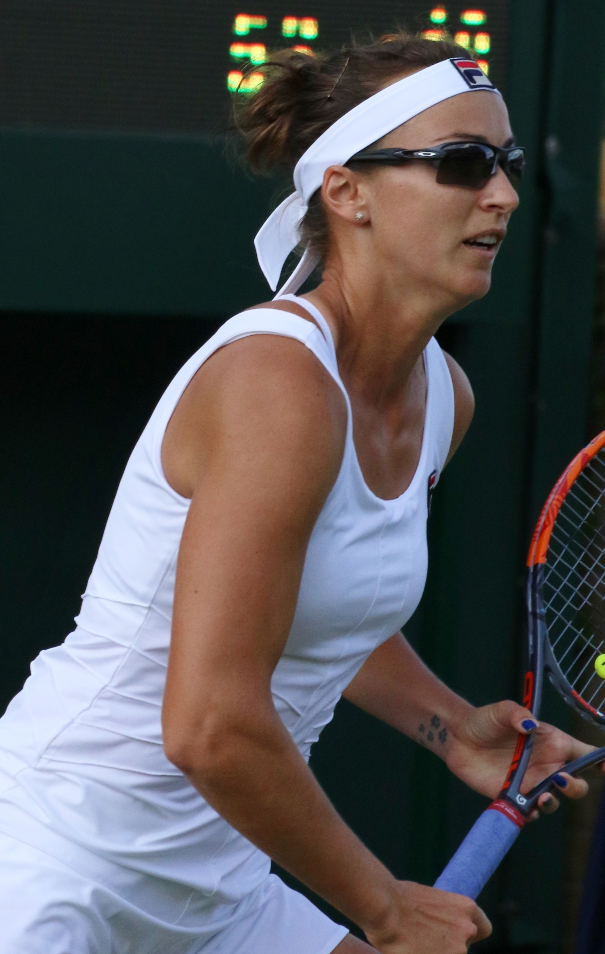 Shvedova WM16 (6)